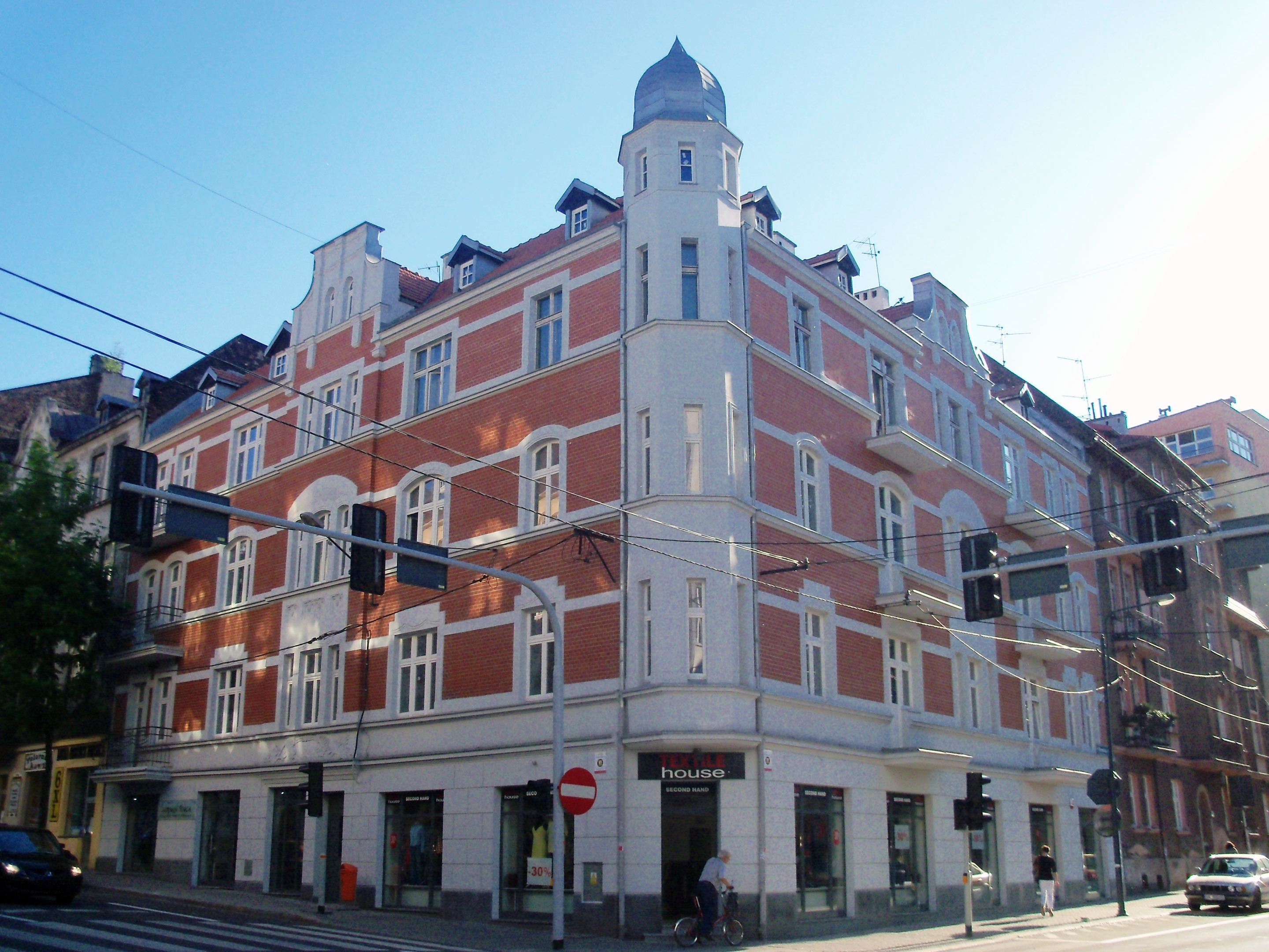 Budynek przy ul. Francuskiej 13 (róg z ul. Wojewódzką)